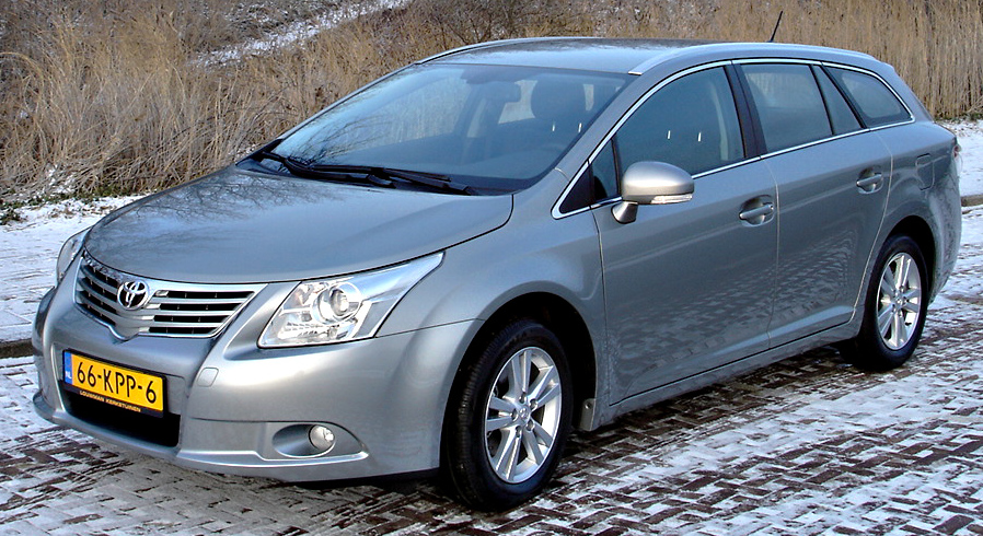 Toyota Avensis 3de generatie